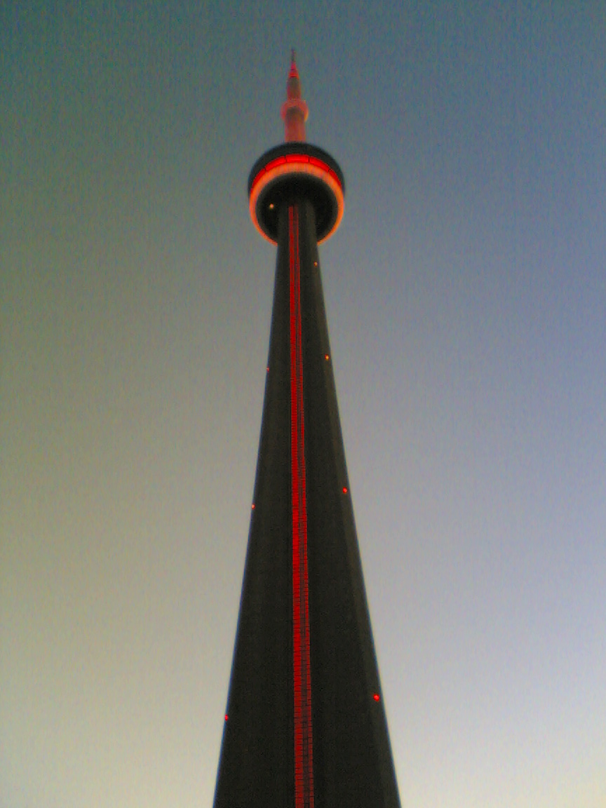 Най-високата свободно стояща сграда в света СиЕн Тауър в Торонто, Канада